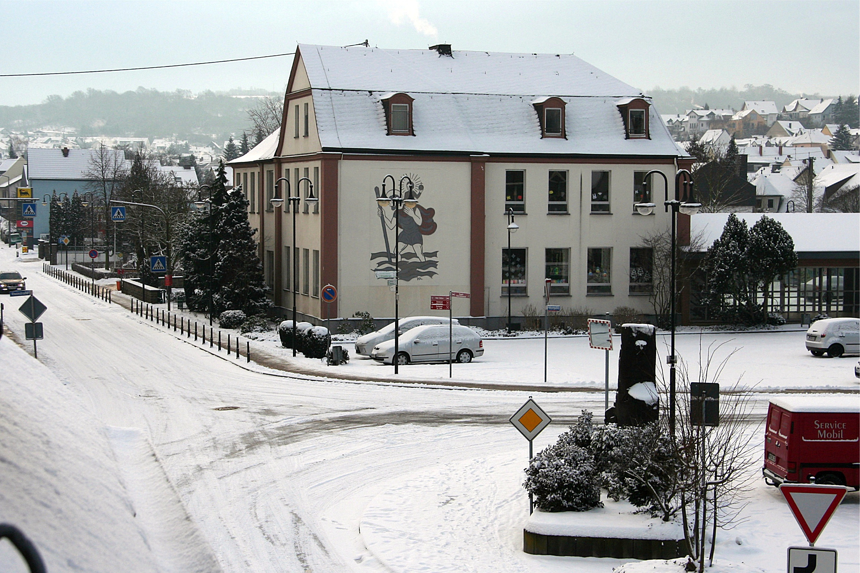 Christophorusschule, ehemalige Grundschule Kärlich